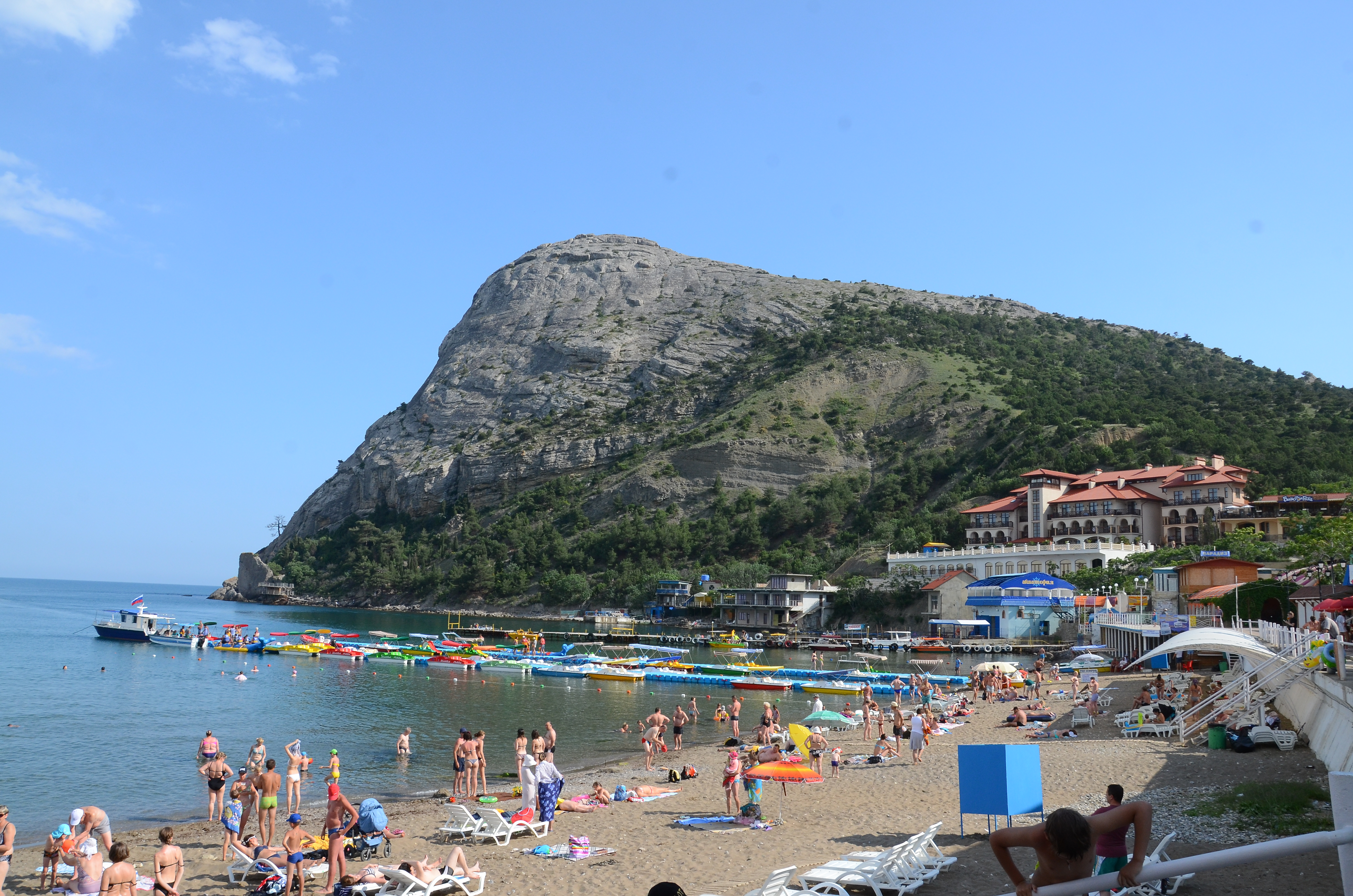 Новый Свет